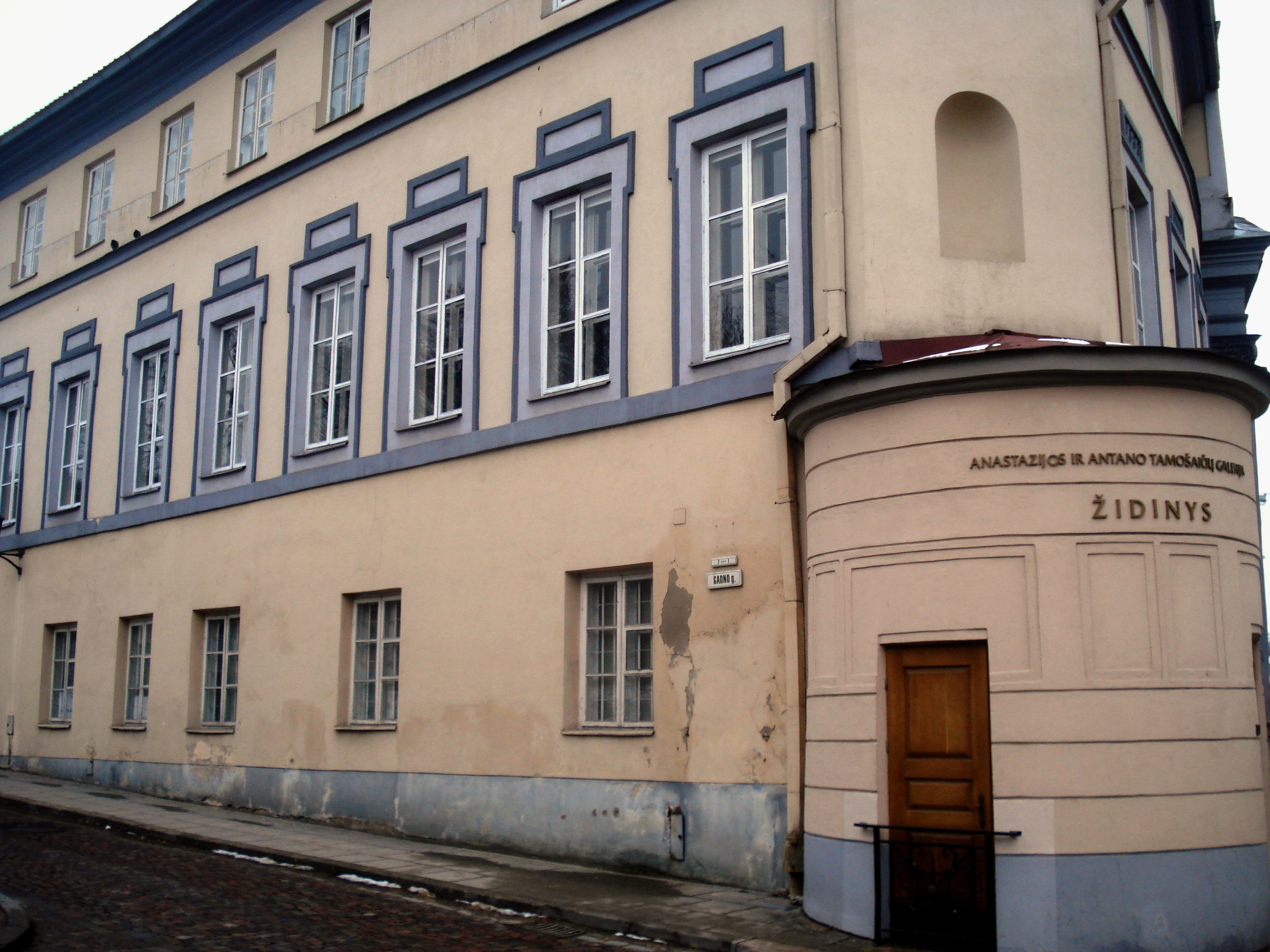 Дворец Гурецких. Вильнюс, Доминикону 15 / Гаоно 1